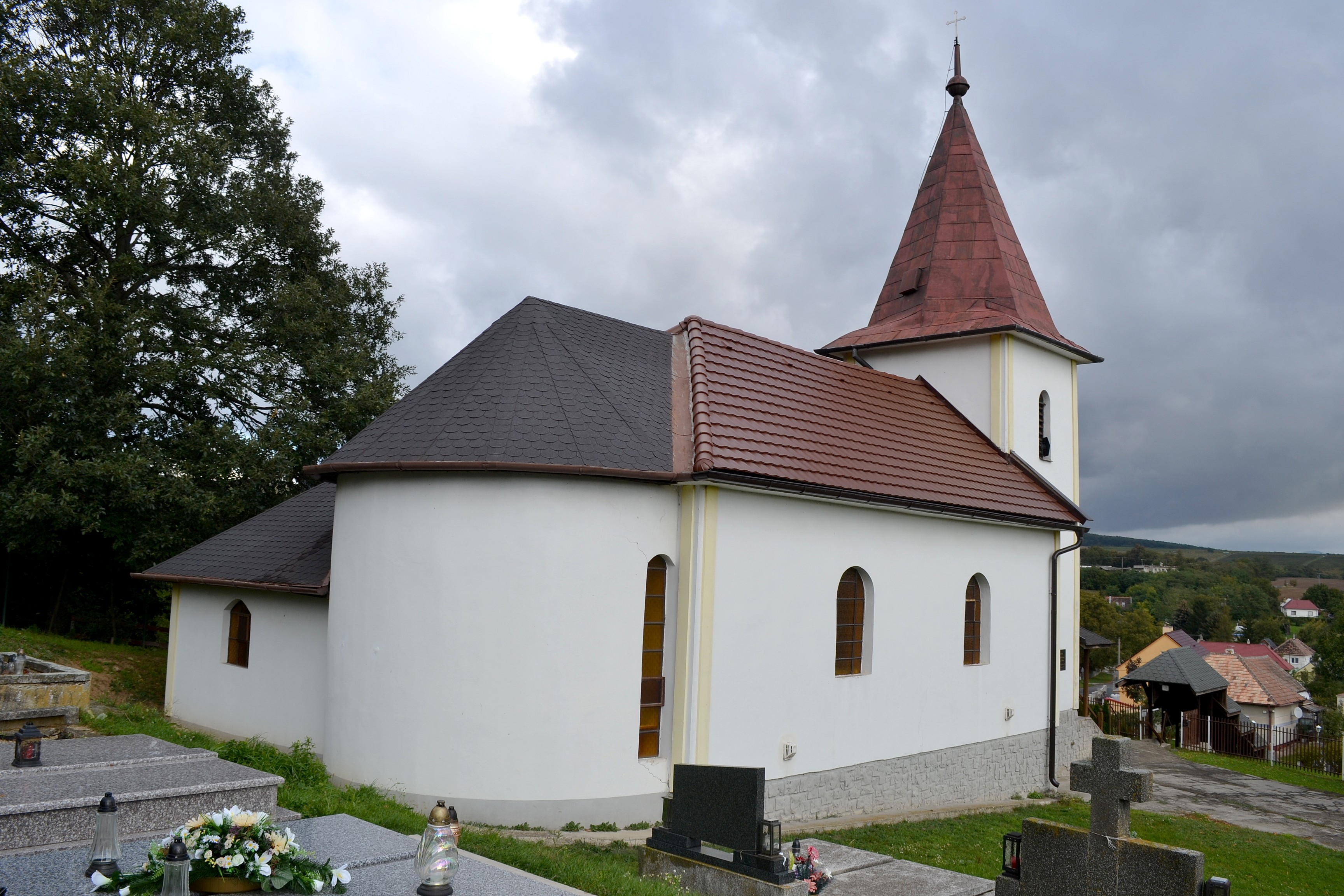 Tepličky (okr. Hlohovec), Kostol Sedembolestnej Panny Márie; celkový pohľad